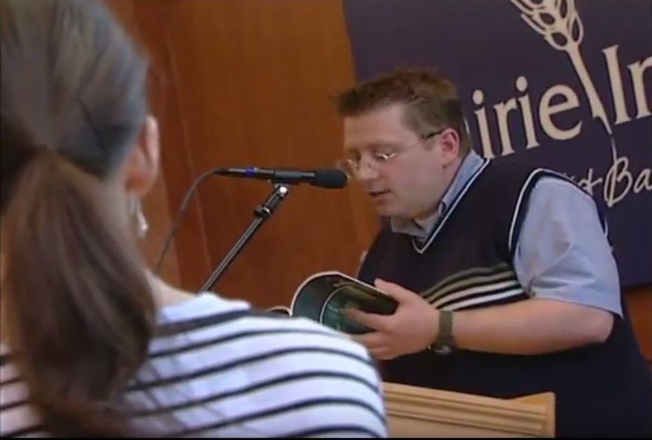 Lecture publique de Laurent Poliquin à la Librairie McNally Robinson de Winnipeg, 2003.